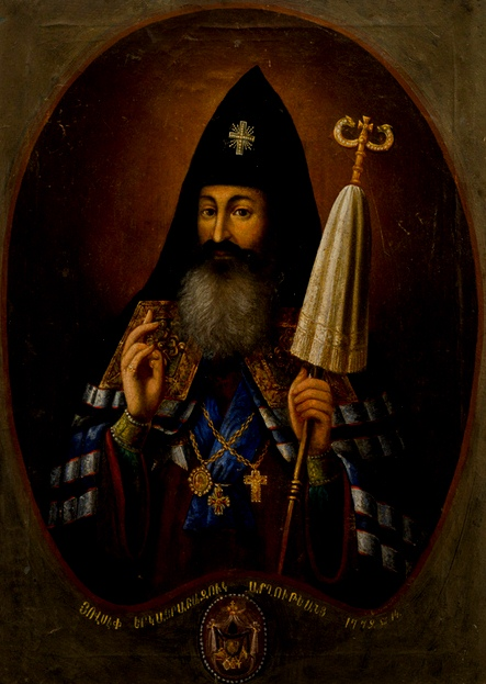 Հովսեփ Արղության